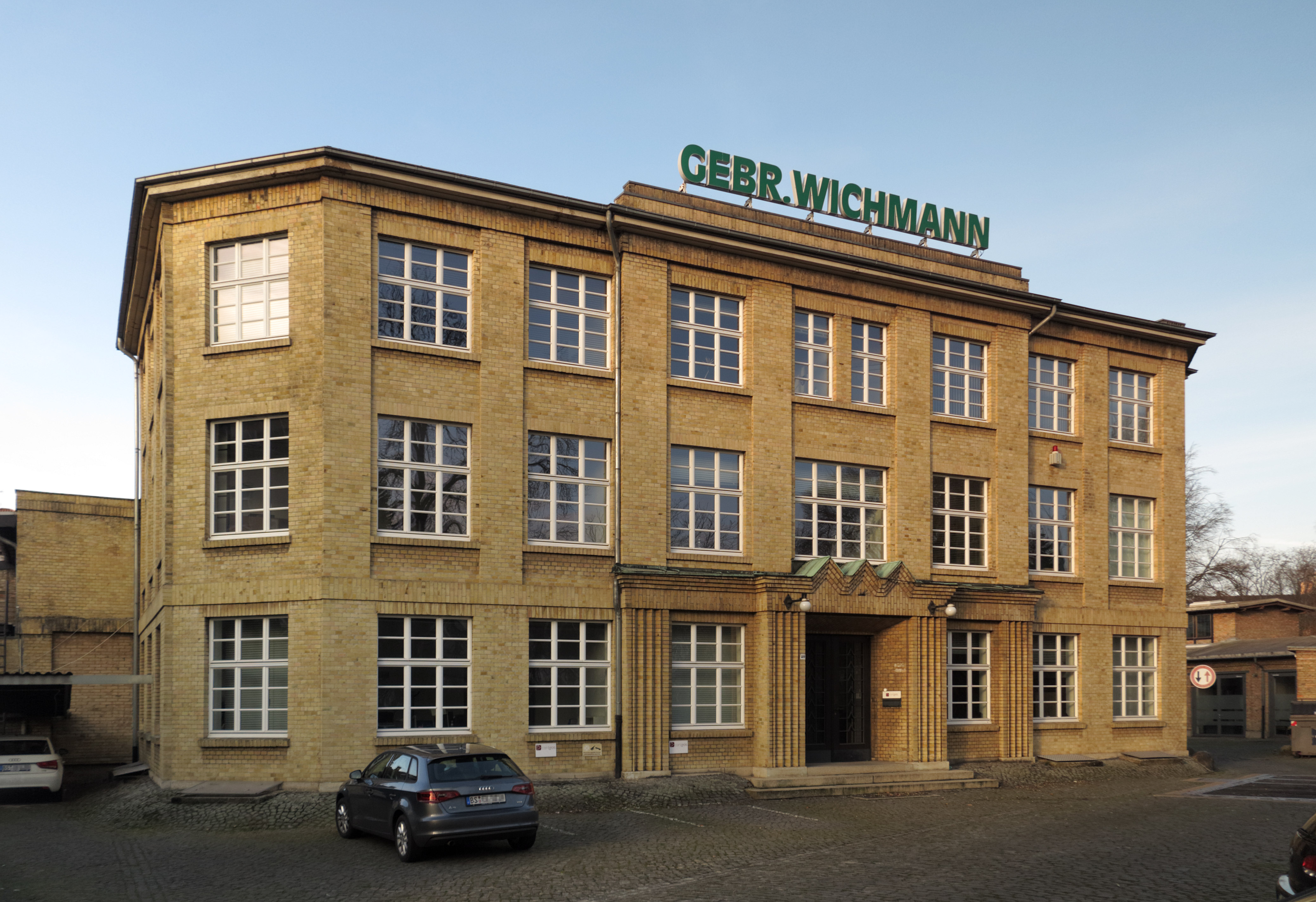 Gebäude der ehemaligen Maschinenfabrik Selwig & Lange in Braunschweig, Sophienstraße 40; unter Denkmalschutz